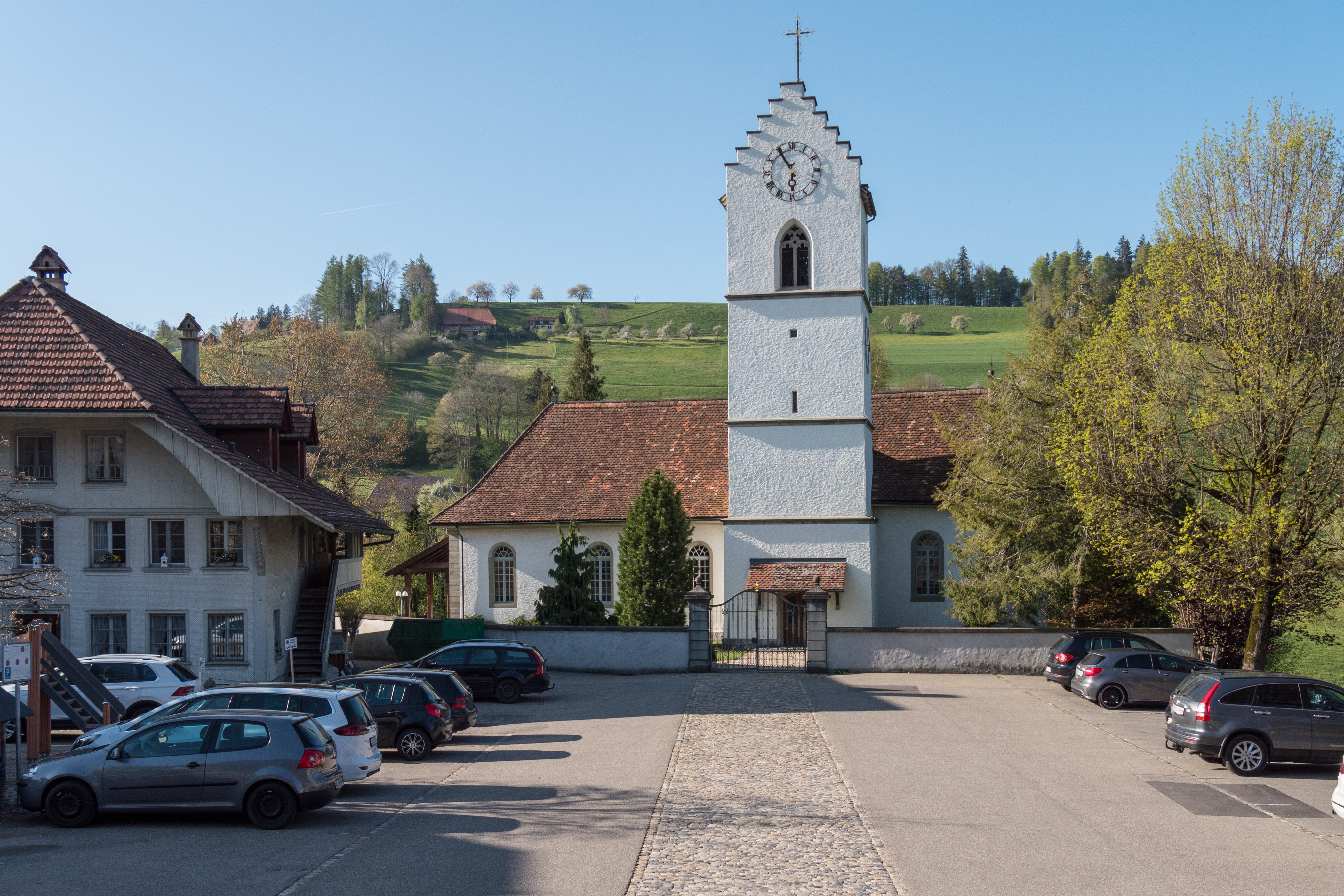 Dürrenroth: Reformierte Kirche, im Kern von 1486, Umbauten 1768/71 u. 1833, renov. 1942/52.